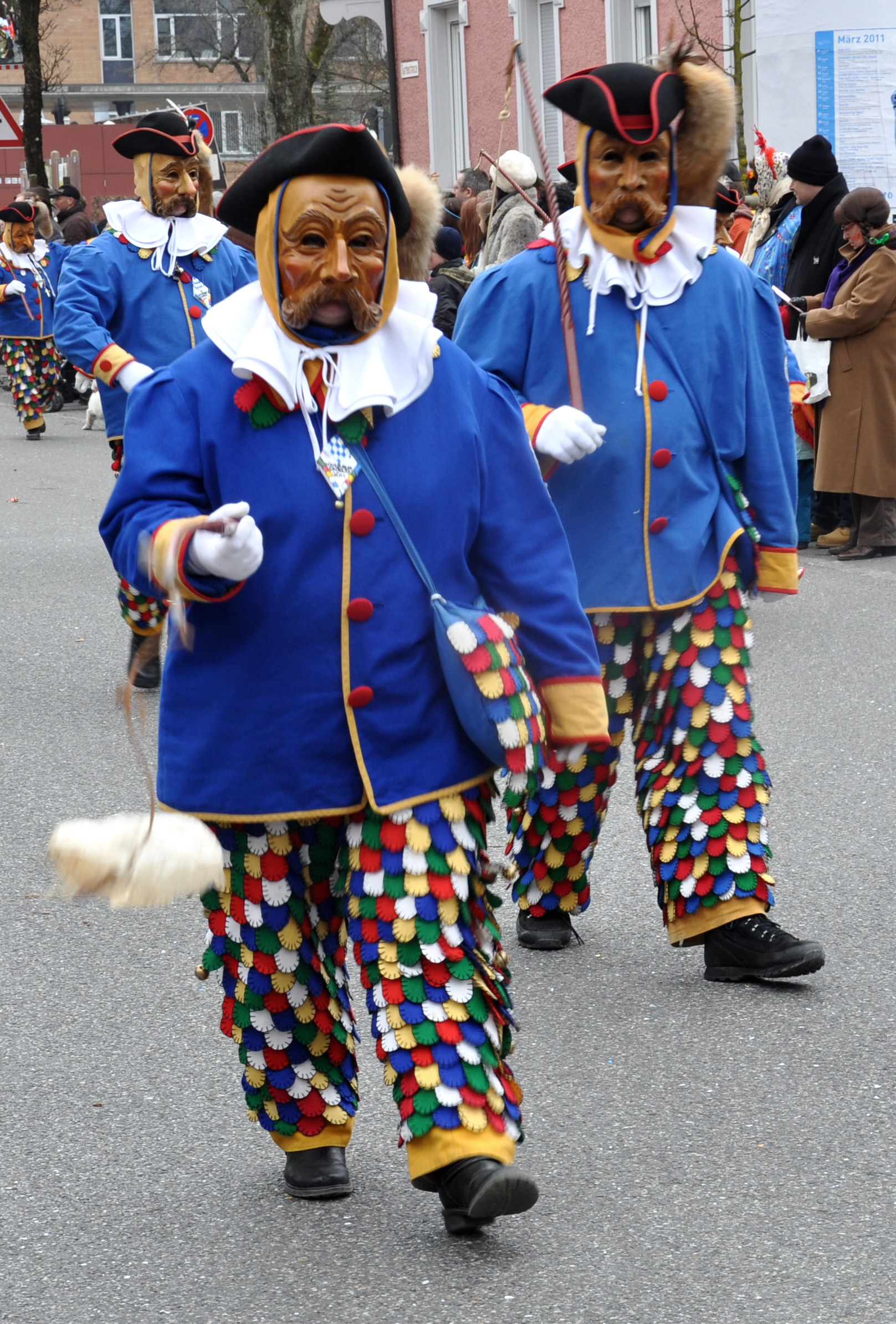 Weingarten (Württemberg), Narrensprung am Fasnetssonntag 2011 Narrenzunft Stadtbutz Günzburg, Narrenfigur „Stadtbutz“